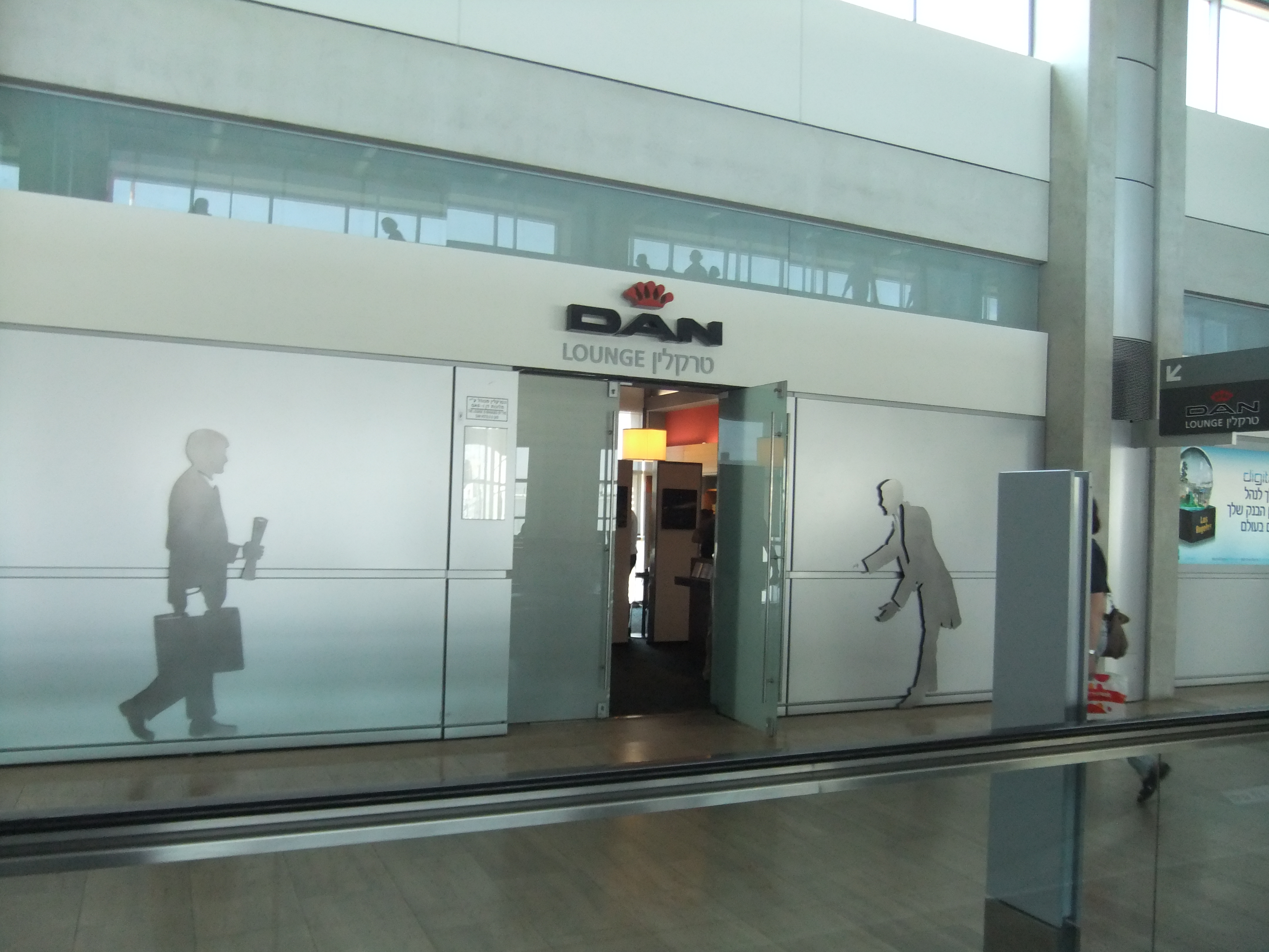 טרקלין דן